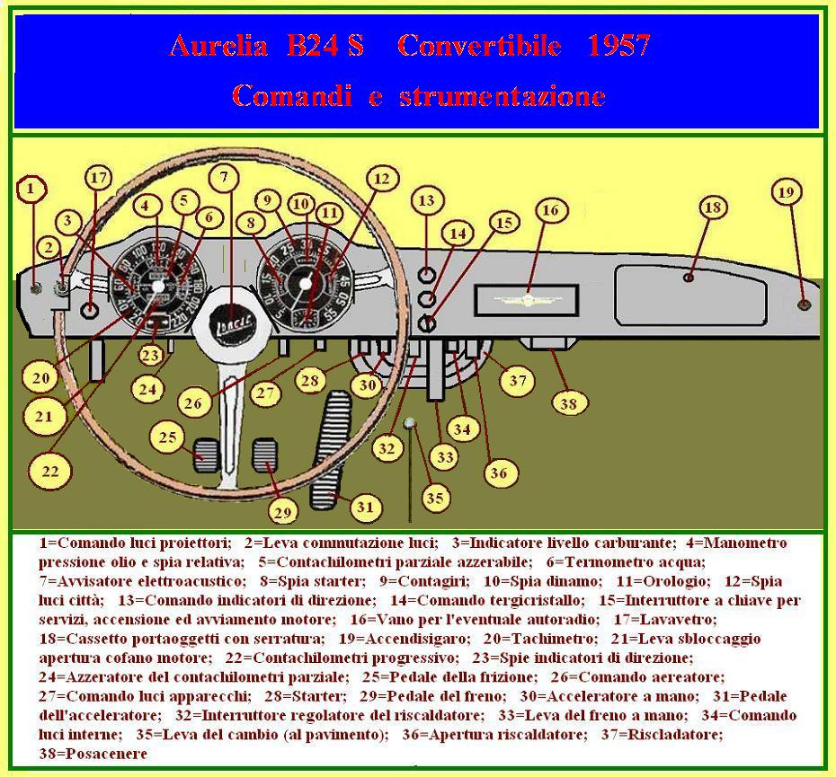 Immagine/disegno ottenuta "autonomamente" ovvero operando con il programma "Paint" di Windows, ispiarandosi (e traendo le necessarie informazioni) da quanto appare a pagina 52 del numero 3 dell'anno 1957 della rivista "Torino Motori".